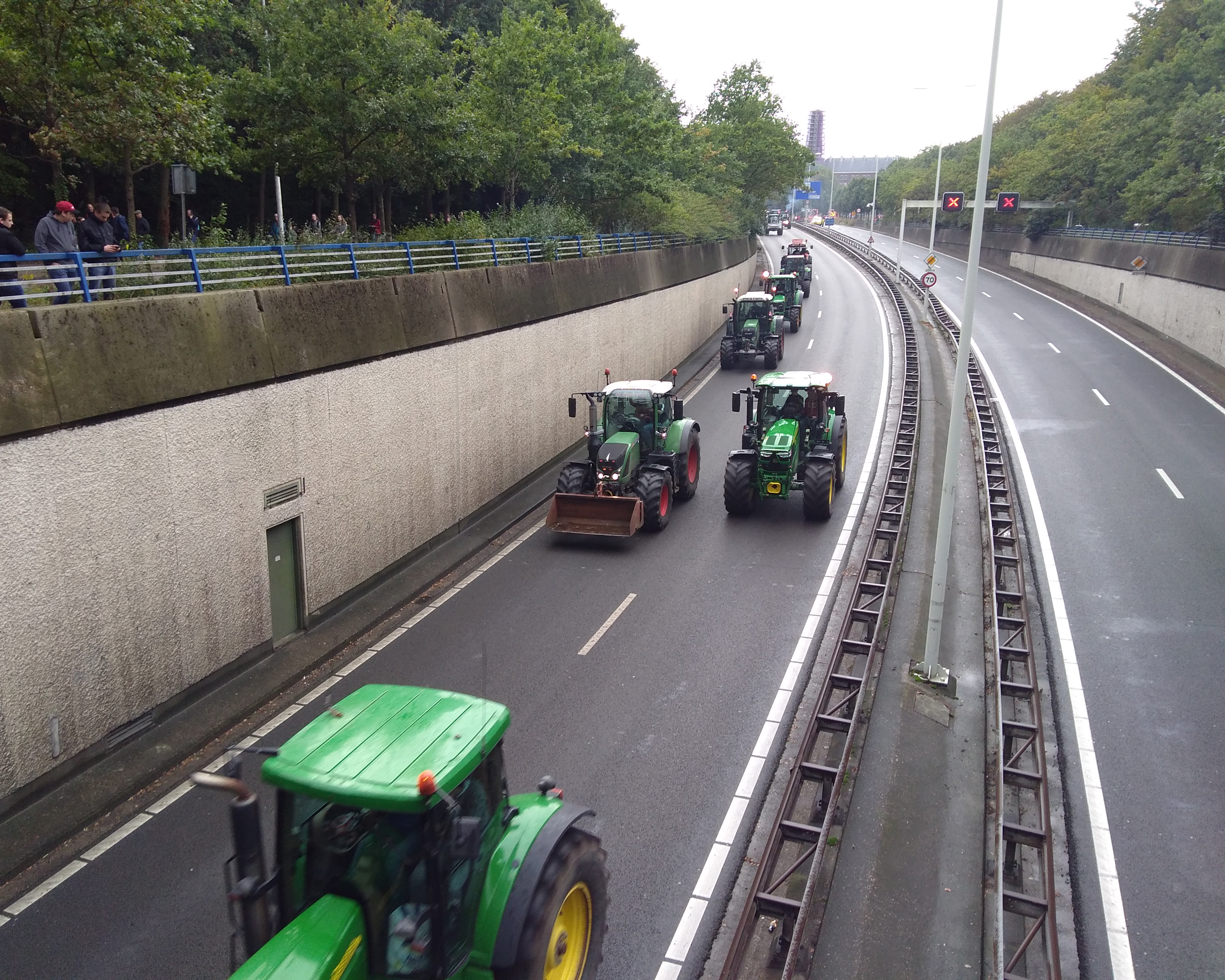 Boeren protesteren in Den Haag op 1 oktober 2019.